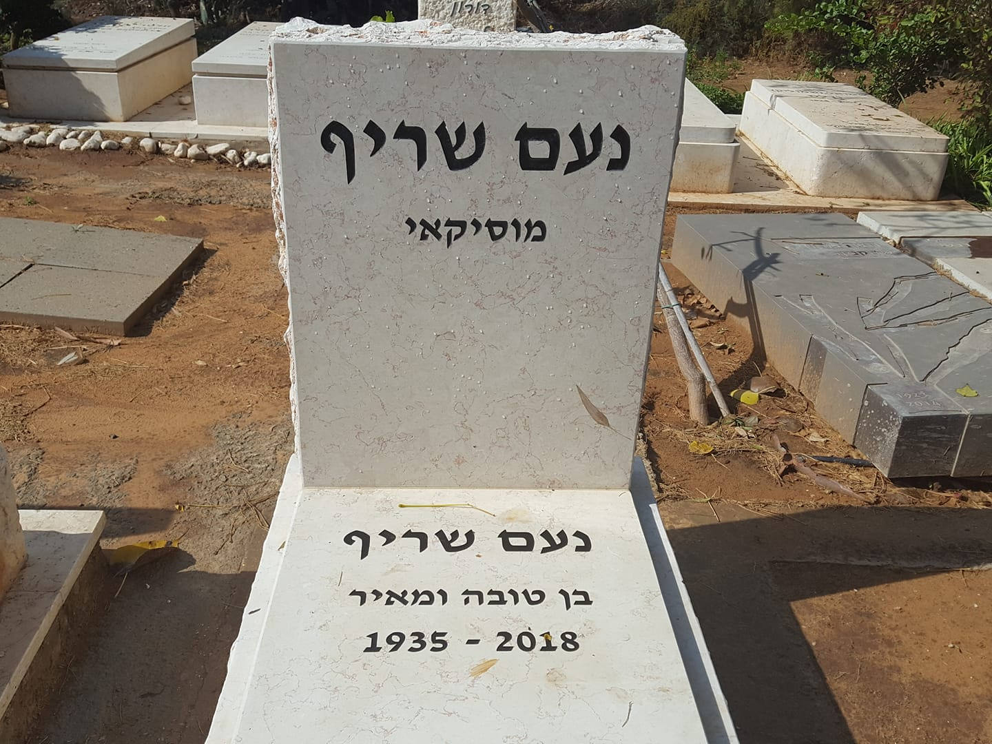 קברו של נועם שריף בשפיים. צילום :אלי אלון